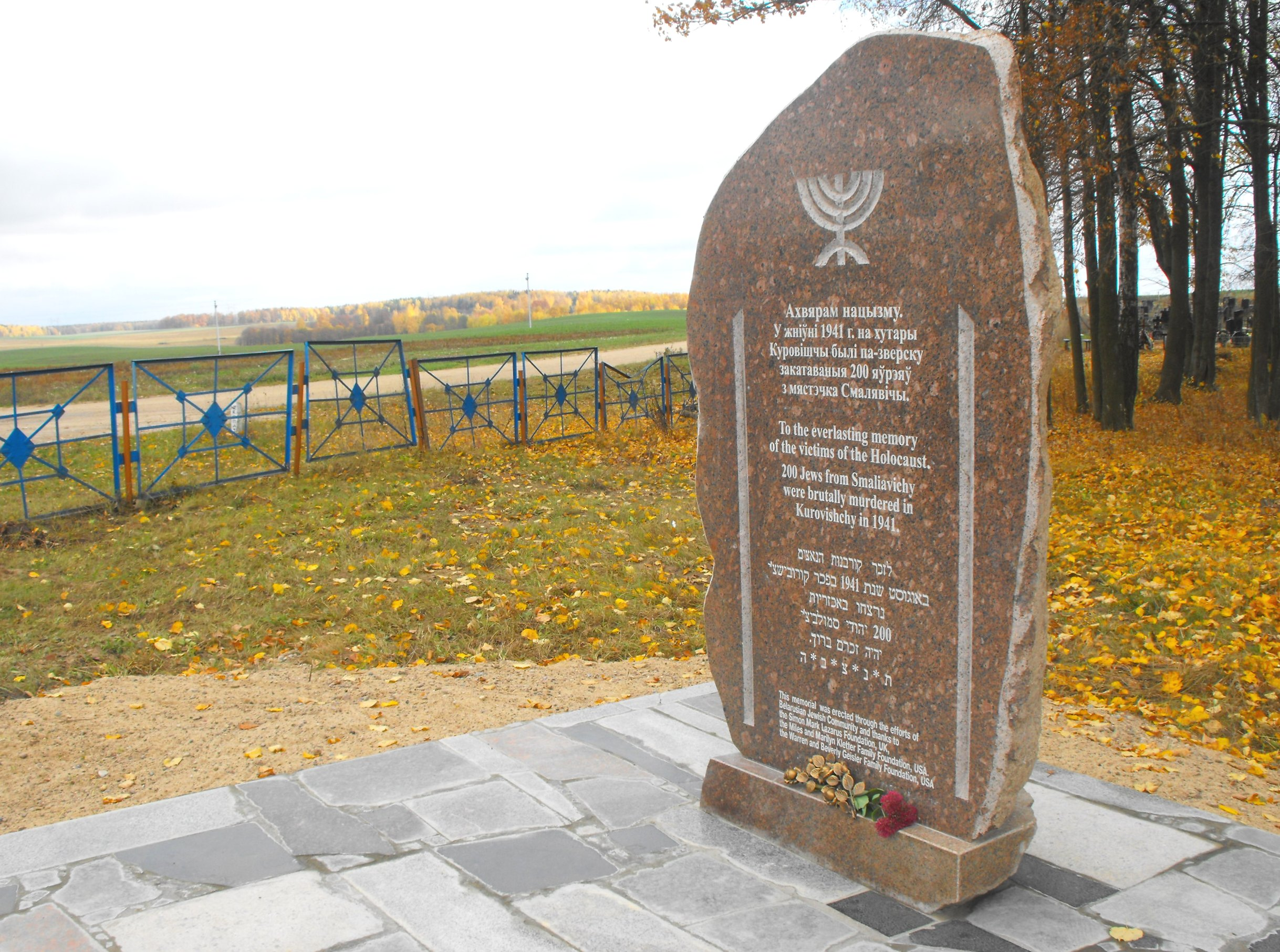 Мемориальный знак в память 200 евреев - узников Смолевичского гетто, убитых нацистами и их пособниками в августе 1941 года возле хутора Куровищи. Находится около еврейского кладбища Смолевич.